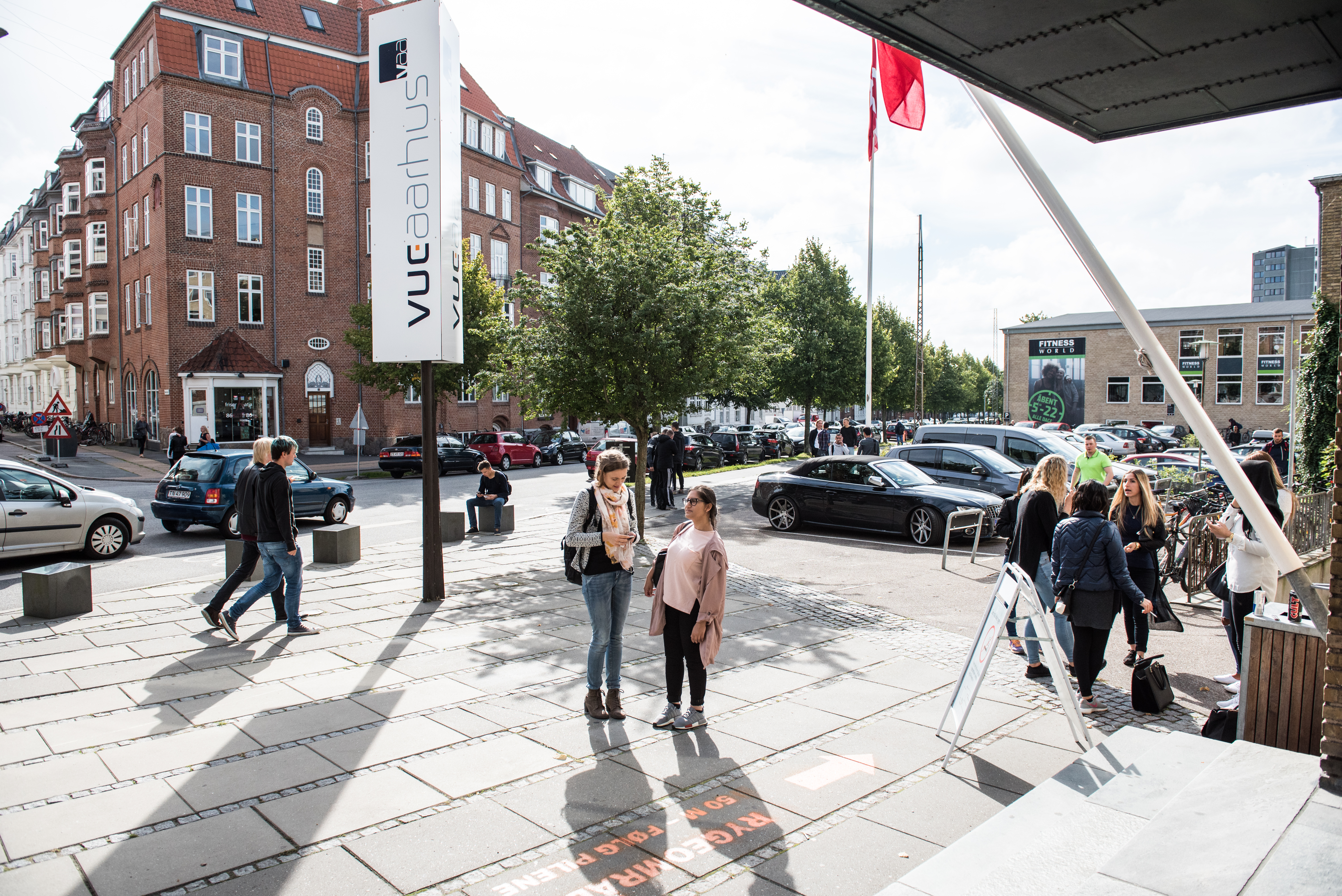 Dalgas Avenue 2 - Første skoledag august 2016